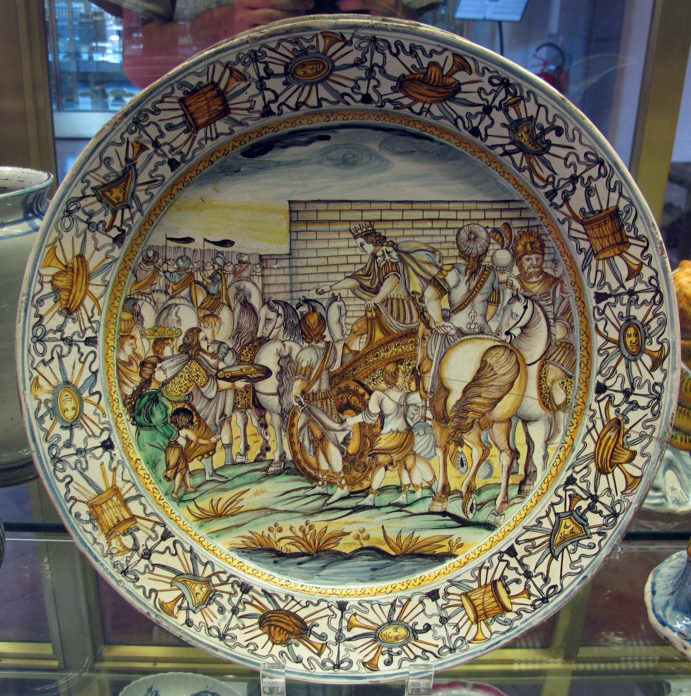 Castelli, francesco grue, piatto con alessandro magno in india (da antonio tempesta), 1650-1700 ca.